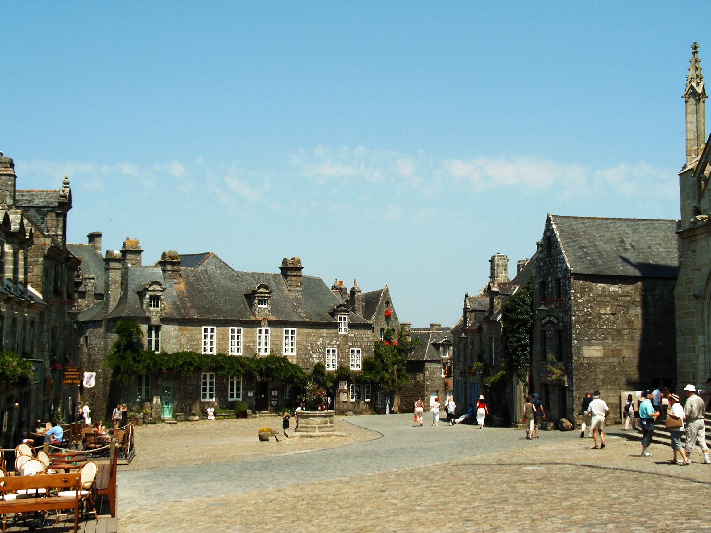 Locronan